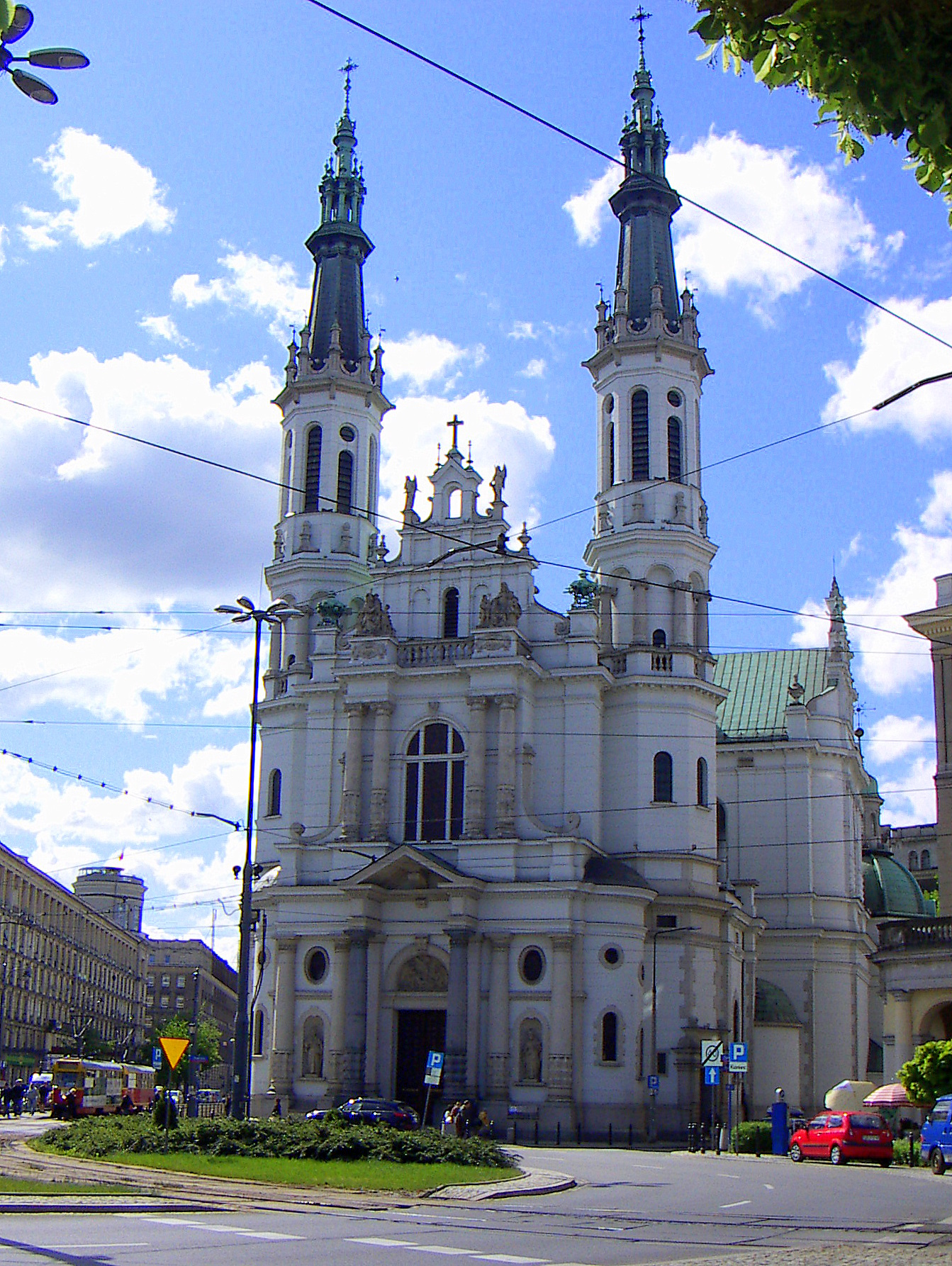 Kościół Najświętszego Zbawiciela w Warszawie